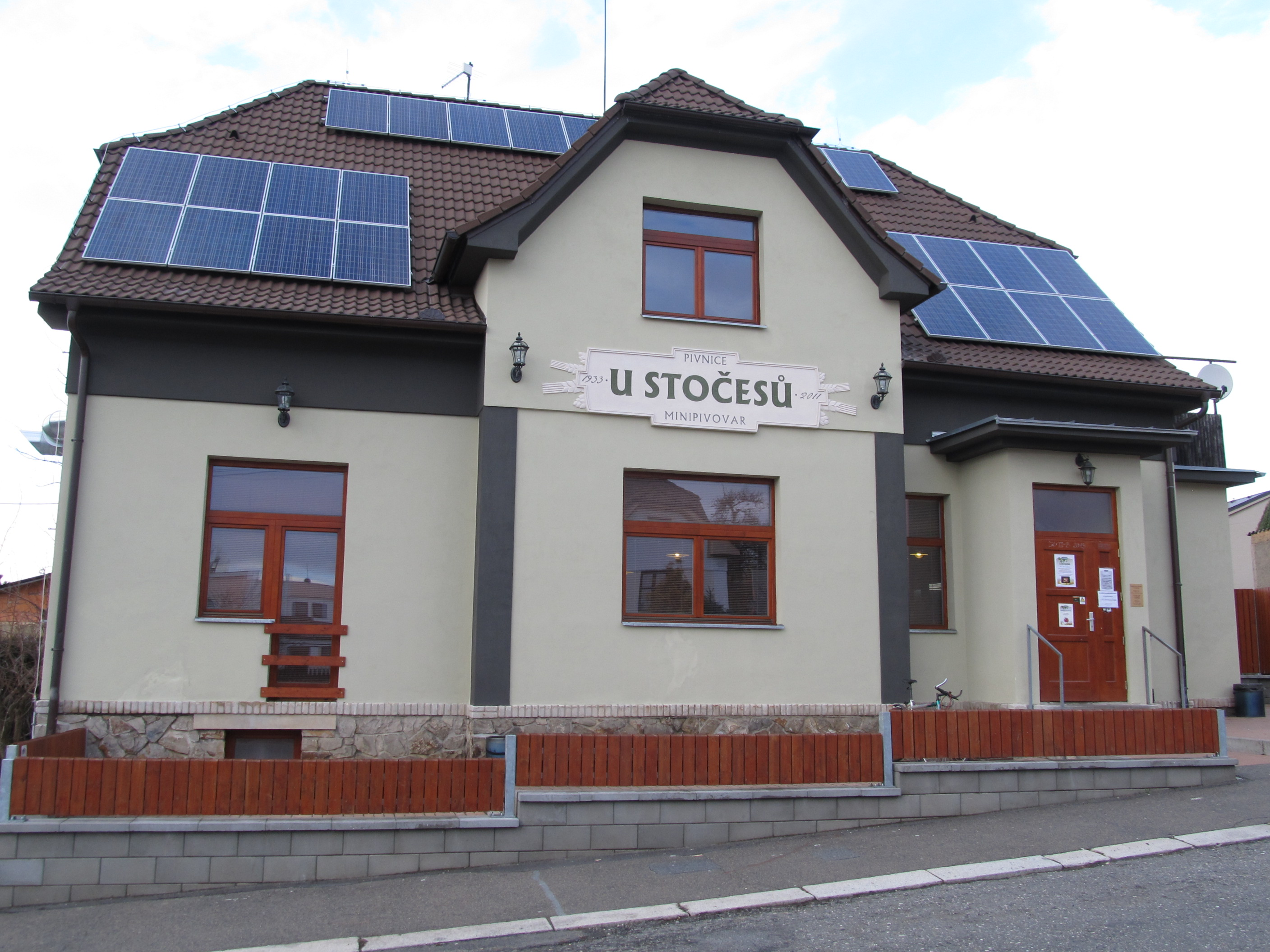 Rokycany - minipivovar U Stočesů